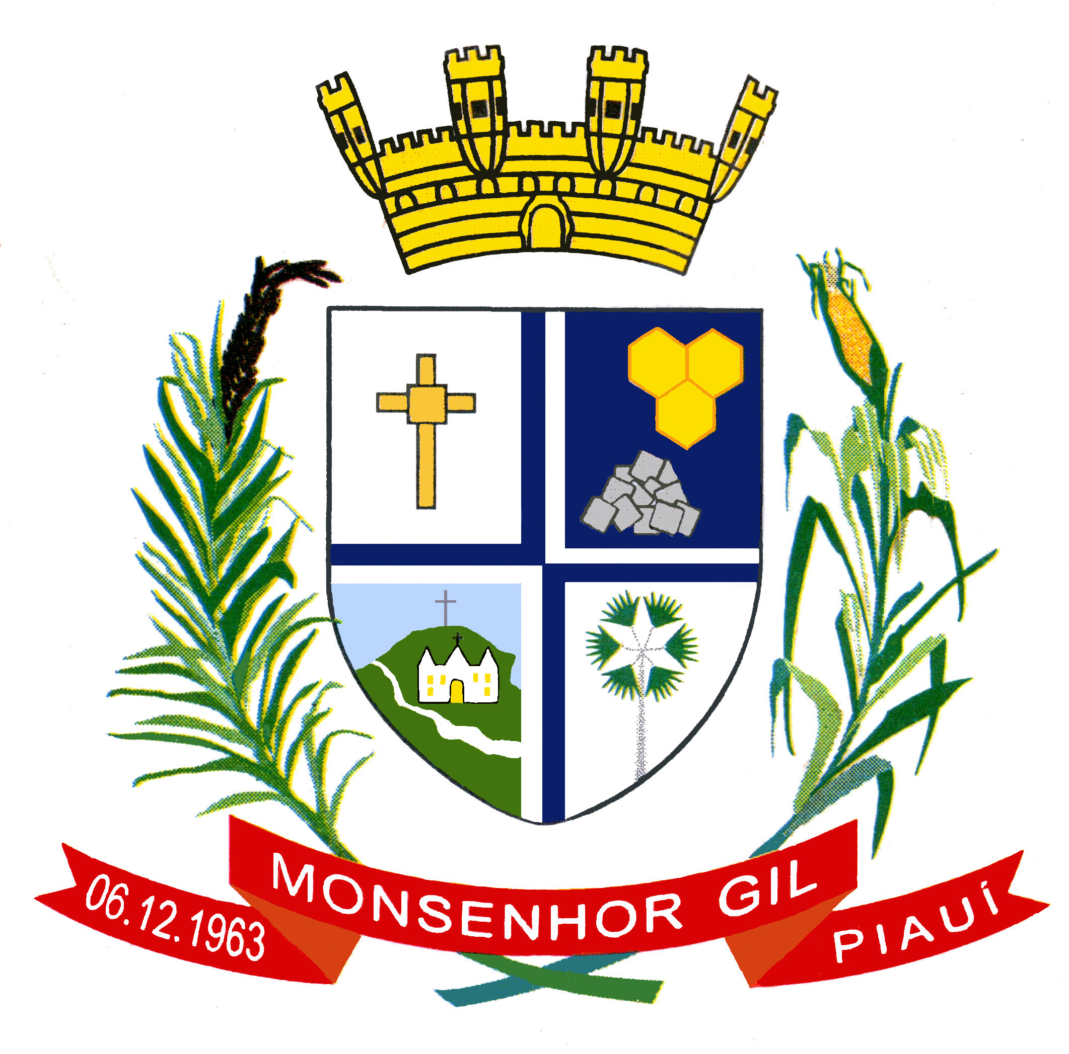 brasão do municipio de monsenhor gil